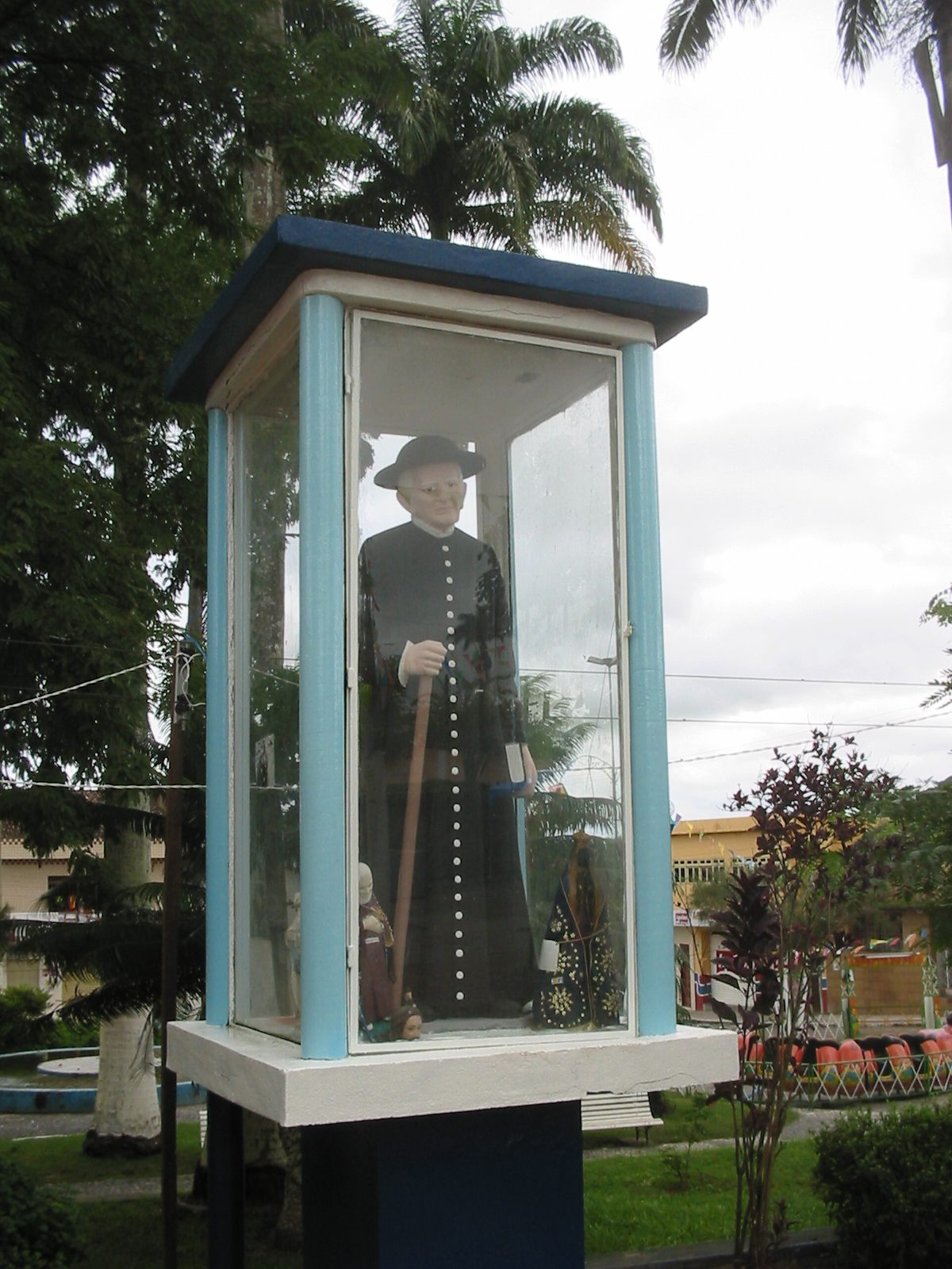 Agrestina (Pernambuco), Brasil. Imagem do Padre Cícero (ao lado, em tamanho reduzido, Frei Damião e Nossa Senhora Aparecida), em exibição pública desde o início da década de 1980. Agrestina (Pernambuco), Brazil. Father Cícero statue.